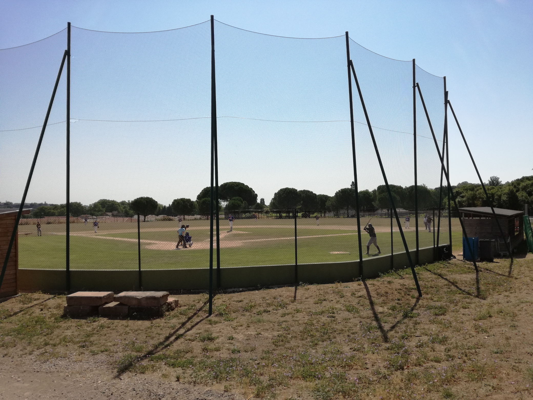 Vue du champ intérieur